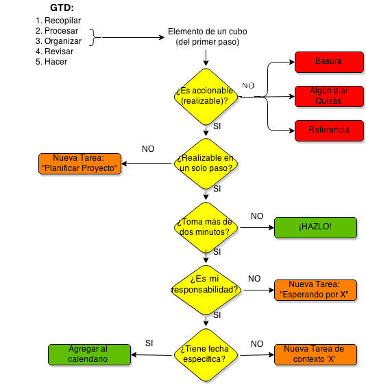 Un ejemplo de algoritmo para los pasos 2 y 3 de la metodología "Getting Things Done" de David Allen